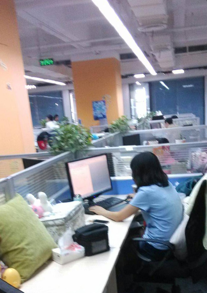 上海淘米工作环境